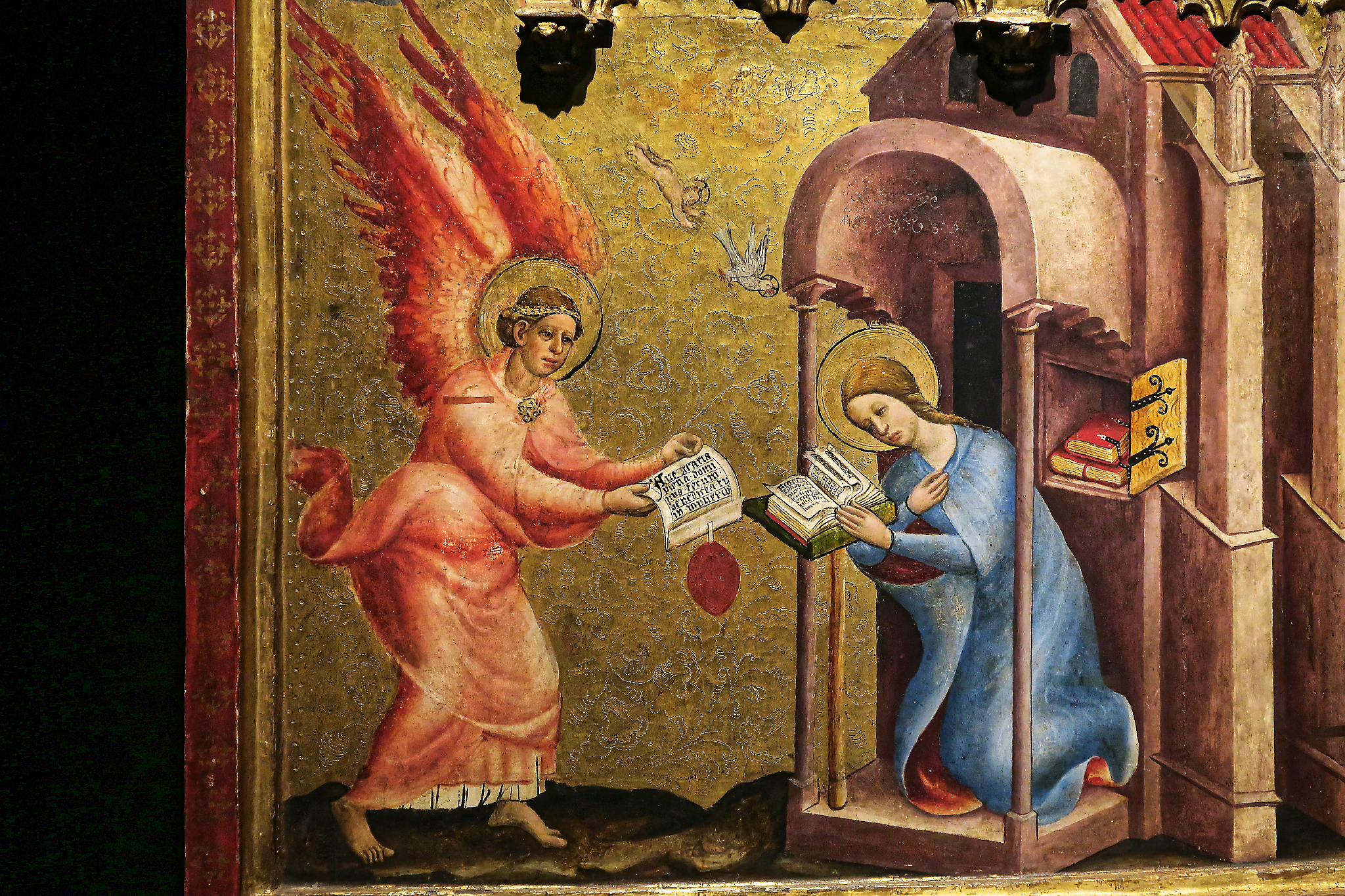 Altar von Schloss Tirol: Szene des Altars von Schloss Tirol, entstanden 1370/72